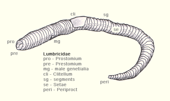 Lumbricidae